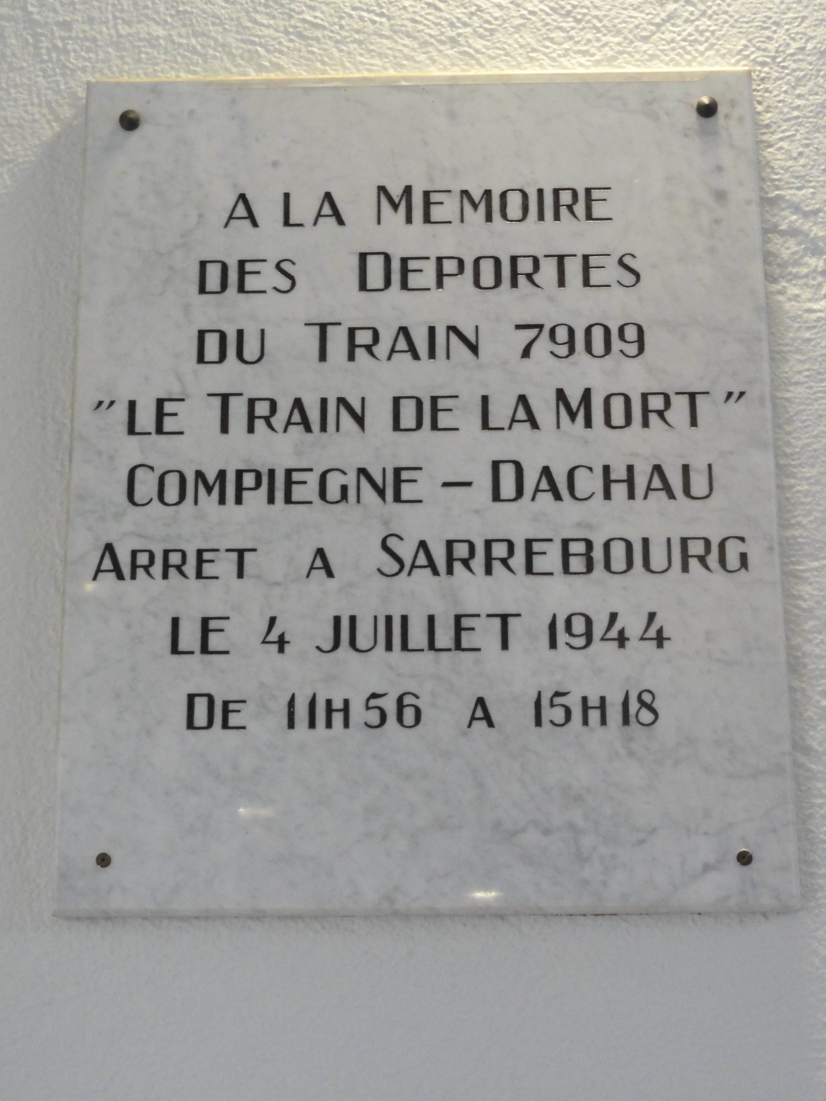 Sarrebourg (Moselle) gare plaque train de la mort 1944